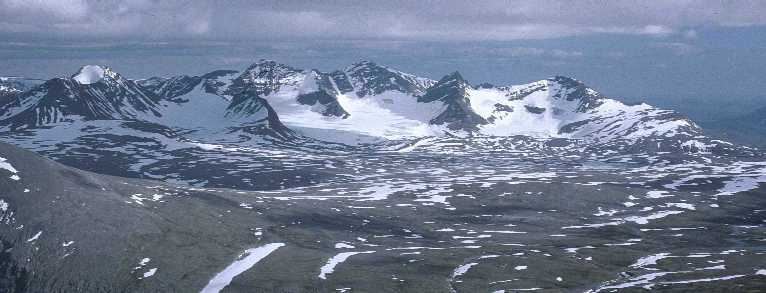 Pårtemassivet i Sarek från norr